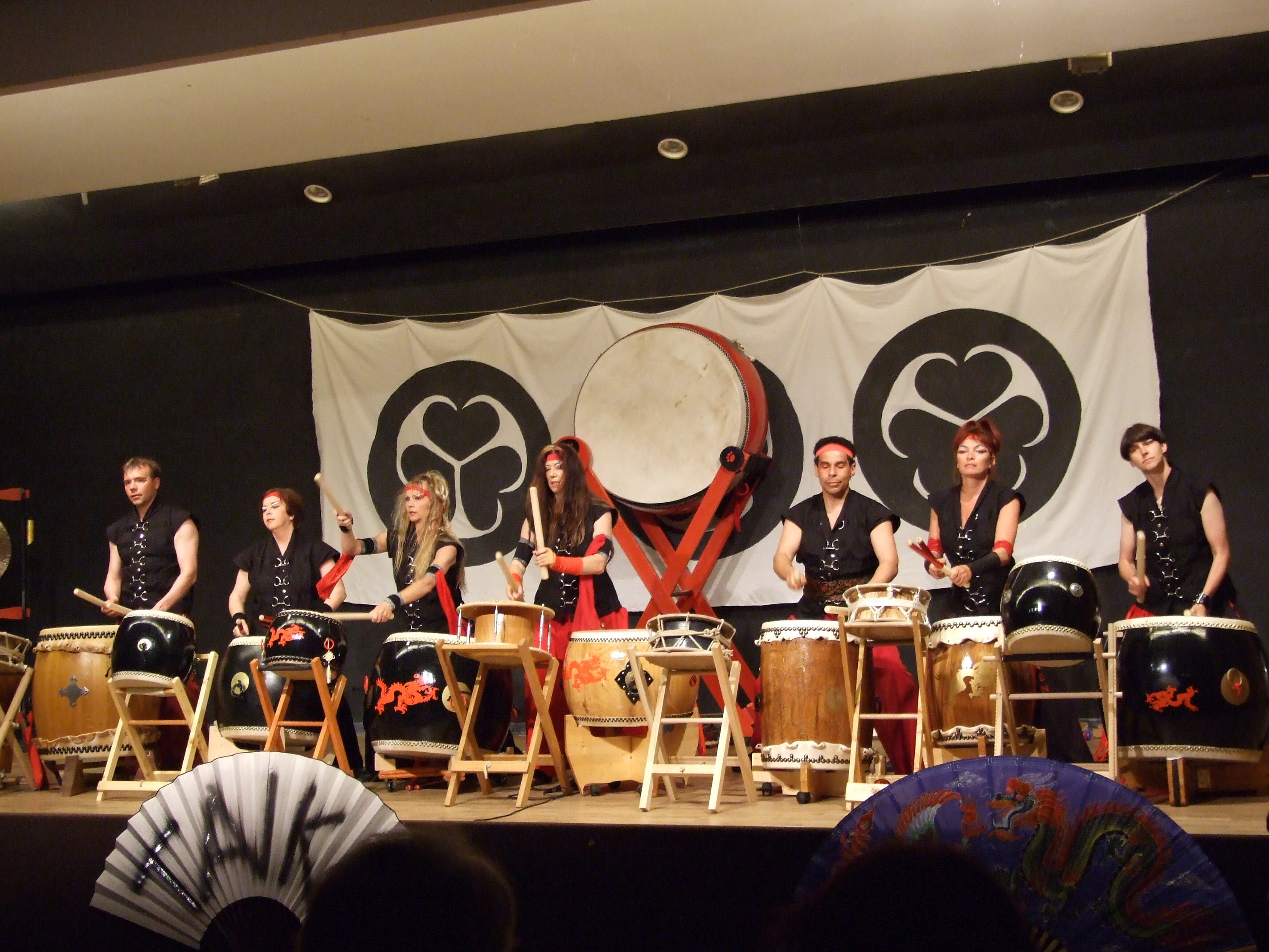 Vorführung an japanischen Trommeln, während der Nacht-der-Museen in Ffm, 2007